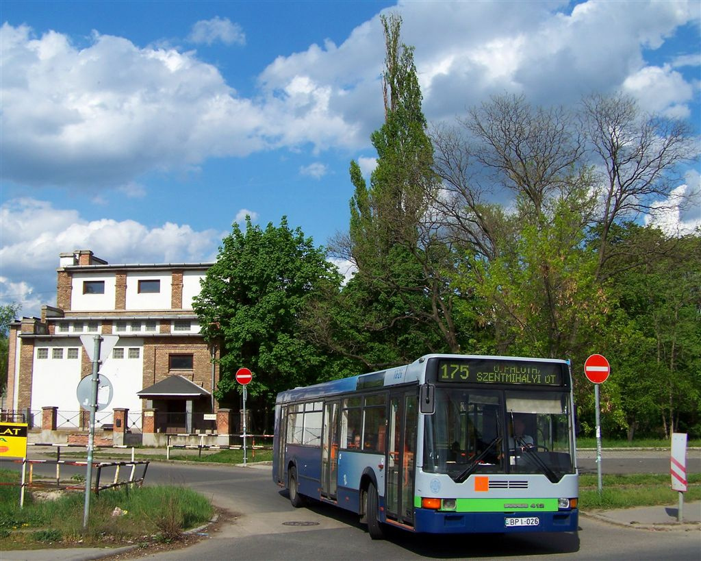 175-ös busz Budapesten